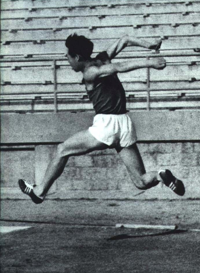 1964-08 1964年 田兆钟打破亚洲1658厘米三级跳记录